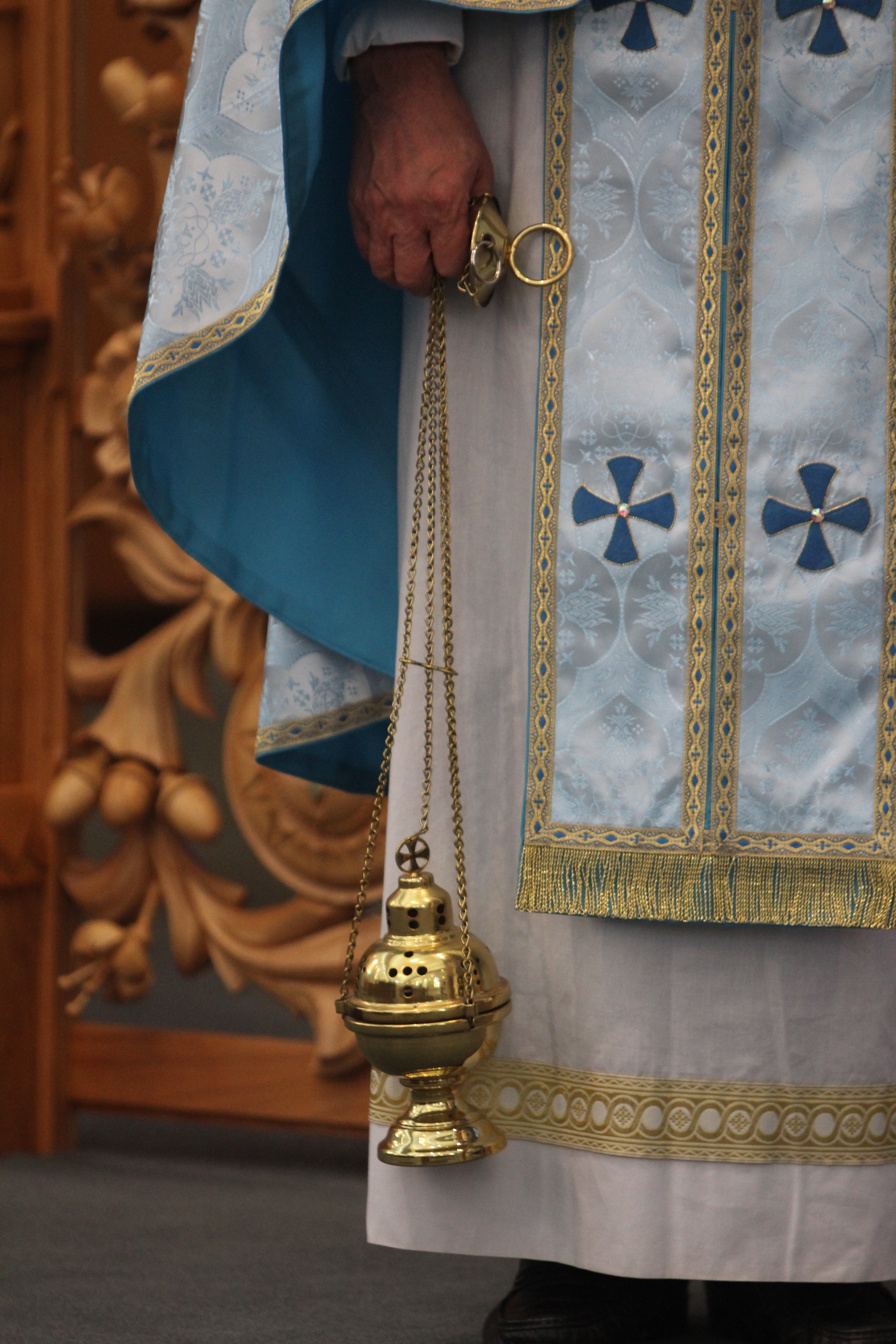 Српски (ћирилица): Поп држи кандило.